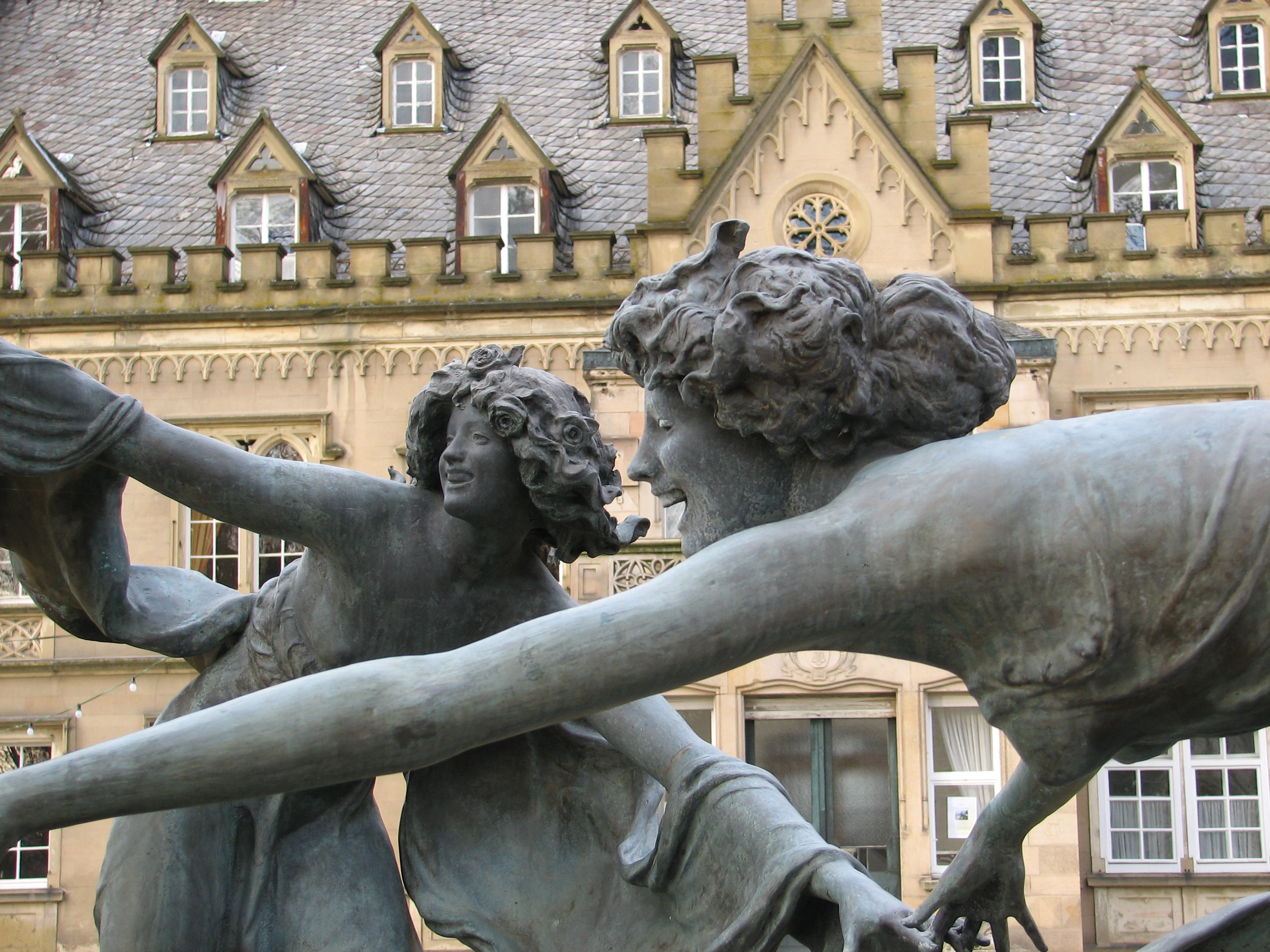 2003 wurde im die Schlosspark von Schloss Gondelsheim in Gondelsheim ein von Spendern finanzierter Nymphenbrunnen errichtet, der eine Replik des Originals „Drei tanzende Mädchen“ von Walter Schott 1903 ist und von dem es nur zwei weitere Exemplare weltweit gibt.